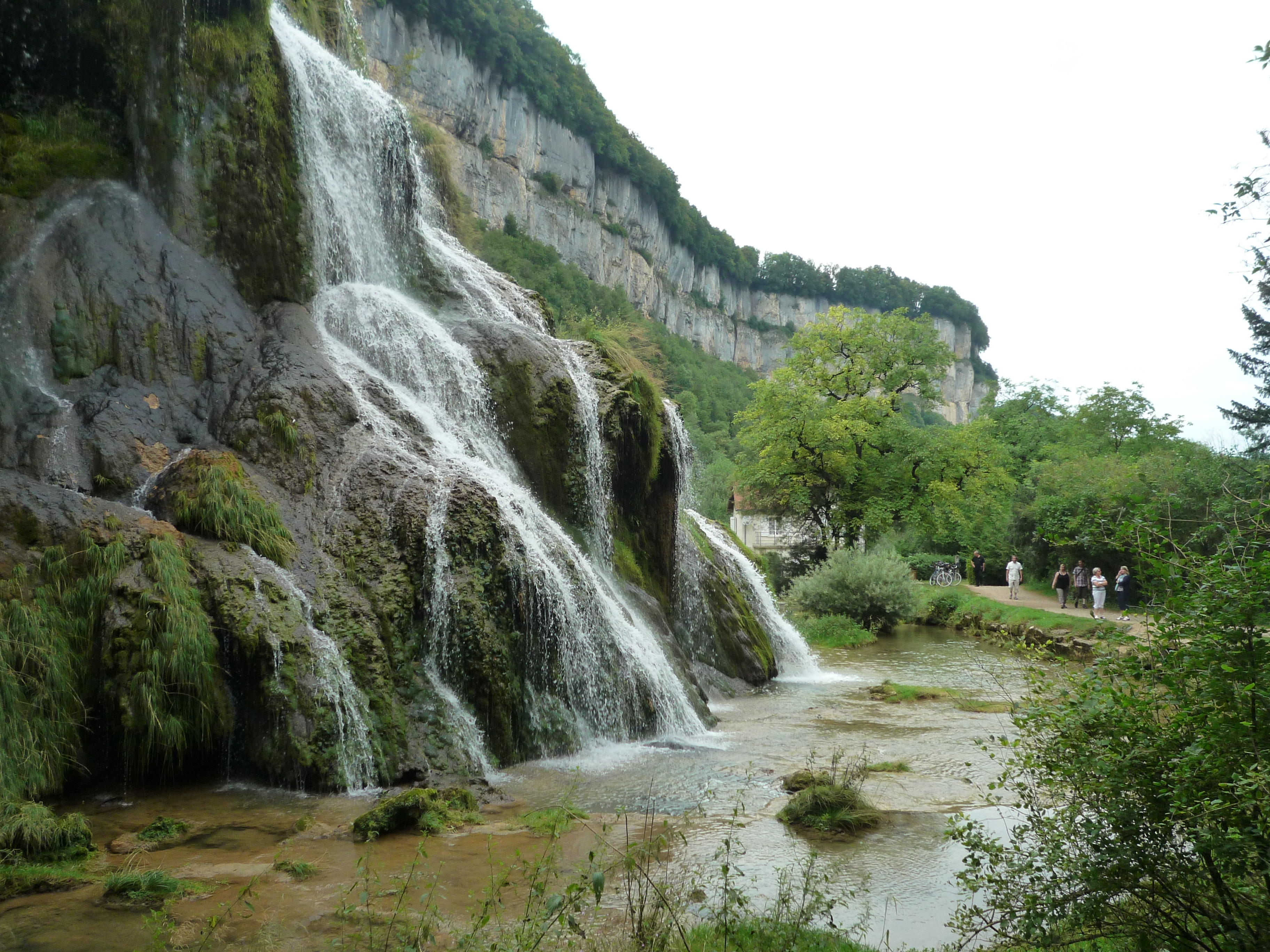 Kalktuffbildung an der Karstquelle des Dard bei Baume-les-Messieurs.